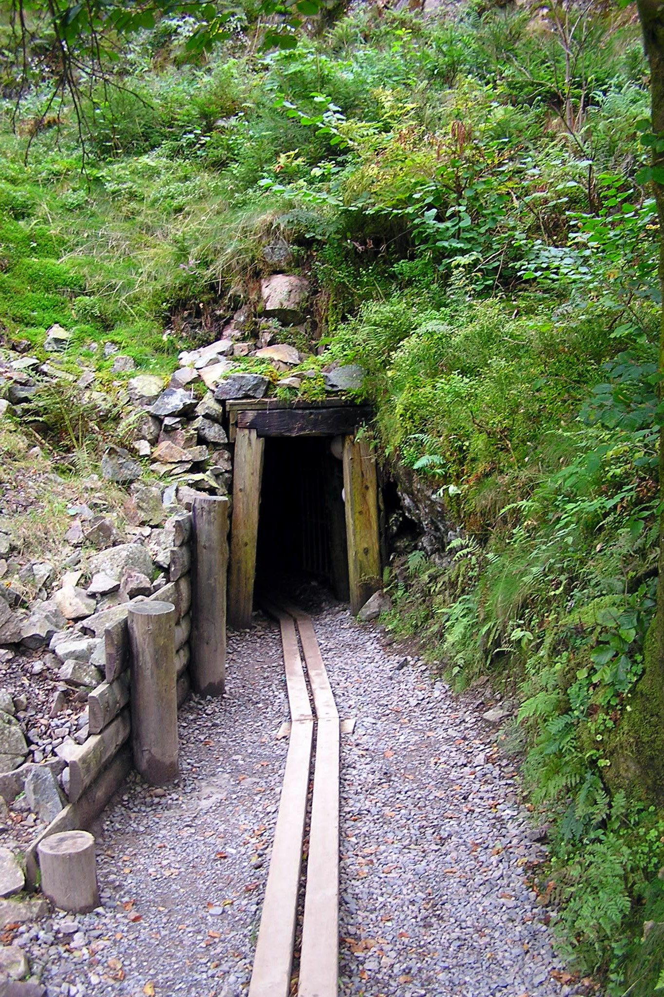 entrée d'une ancienne mine de cuivre au Thillot (Vosges) This building is en partie classé, en partie inscrit au titre des Monuments Historiques. It is indexed in the Base Mérimée, a database of architectural heritage maintained by the French Ministry of Culture, under the references PA00135700 and PA00135422 .